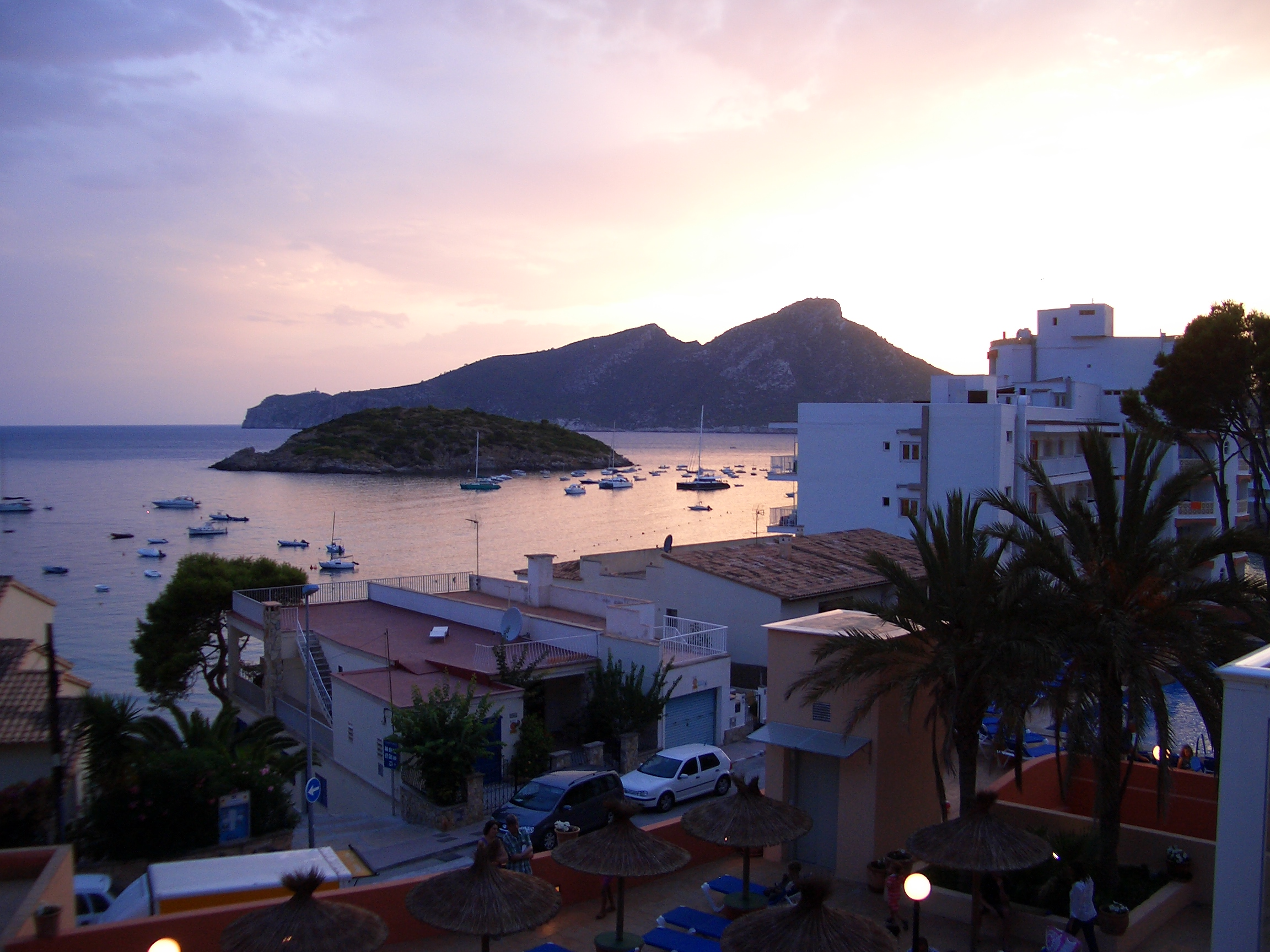 Blick auf die Dracheninsel bei unterschiedlicher Wetterlage und Tageszeit 5